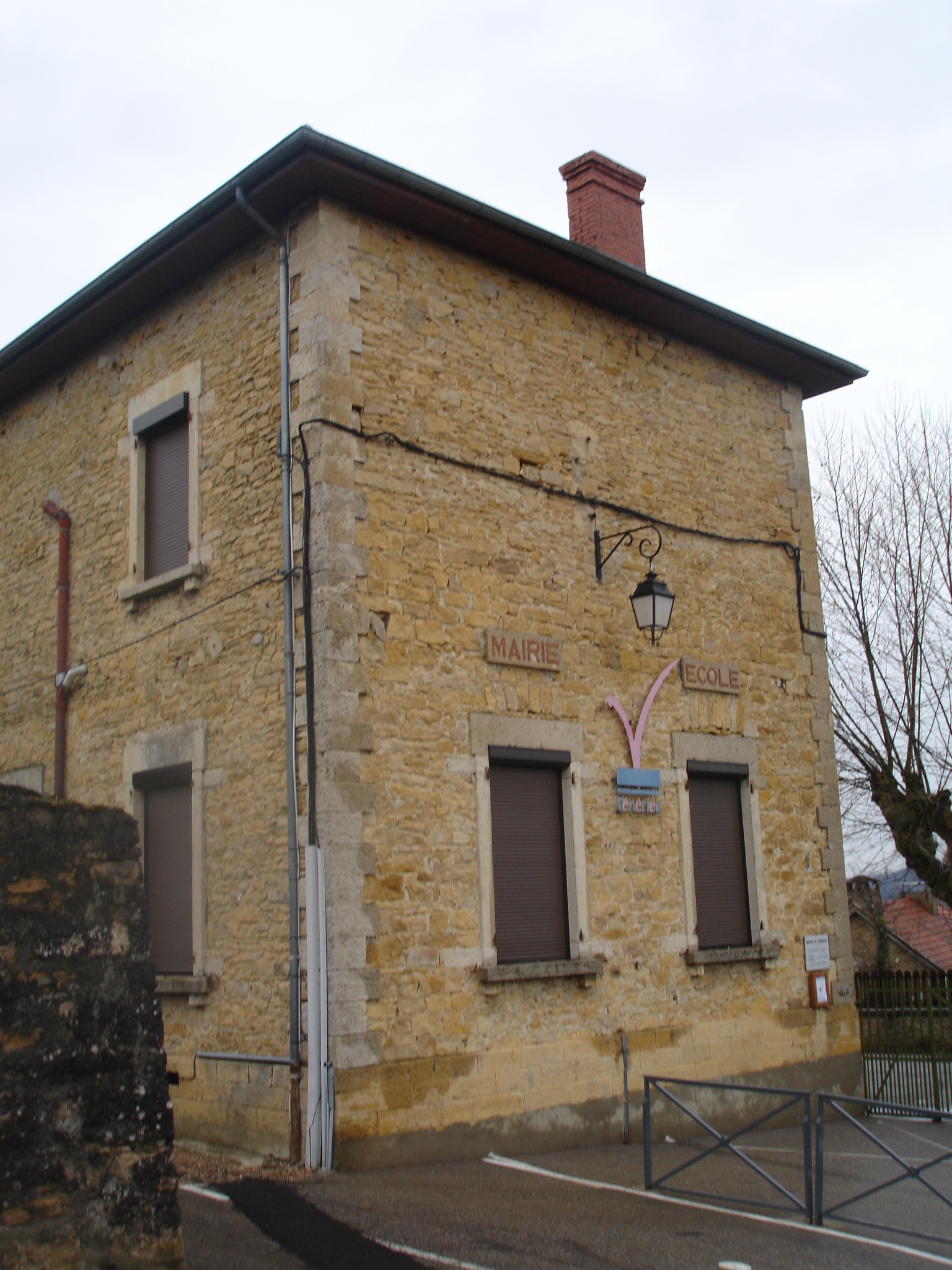 Vénérieu (38) : La mairie